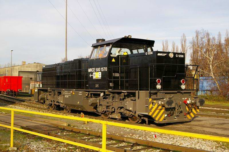 Mülheim an der Ruhr Rhein-Ruhr-Hafen Hafenbahnhof Lok MRCE 500 1570